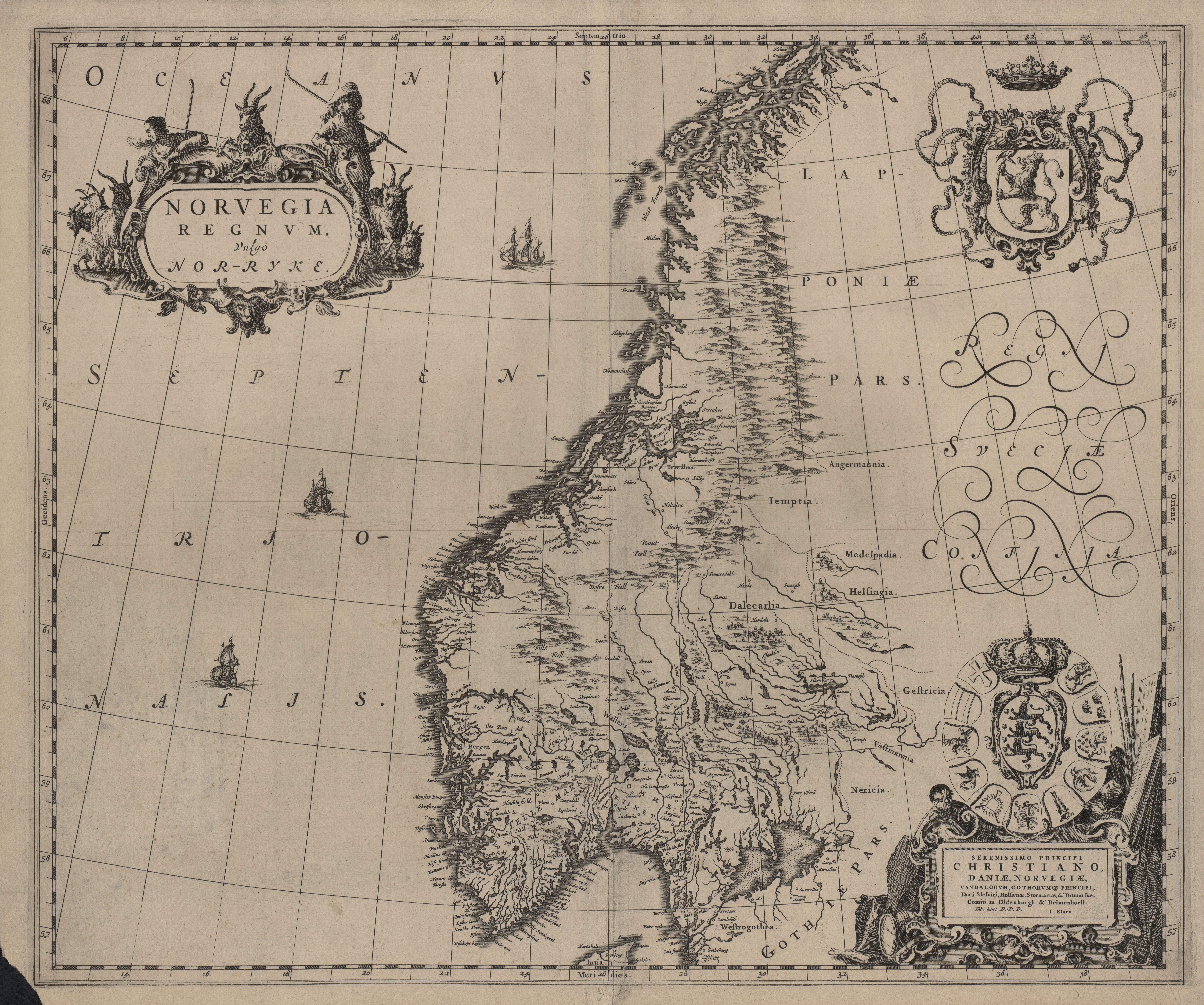 Kart fra Nasjonalbibliotekets kartsamling. Kartet er gitt ut i Amsterdam (1659) og viser Norge.